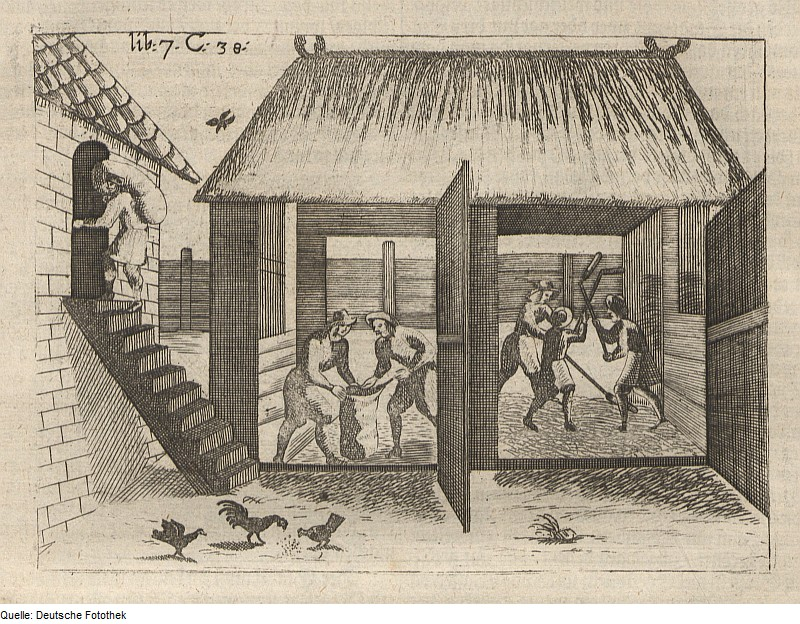 Original image description from the Deutsche Fotothek Landwirtschaft & Getreideanbau & Dreschen & Lagerung